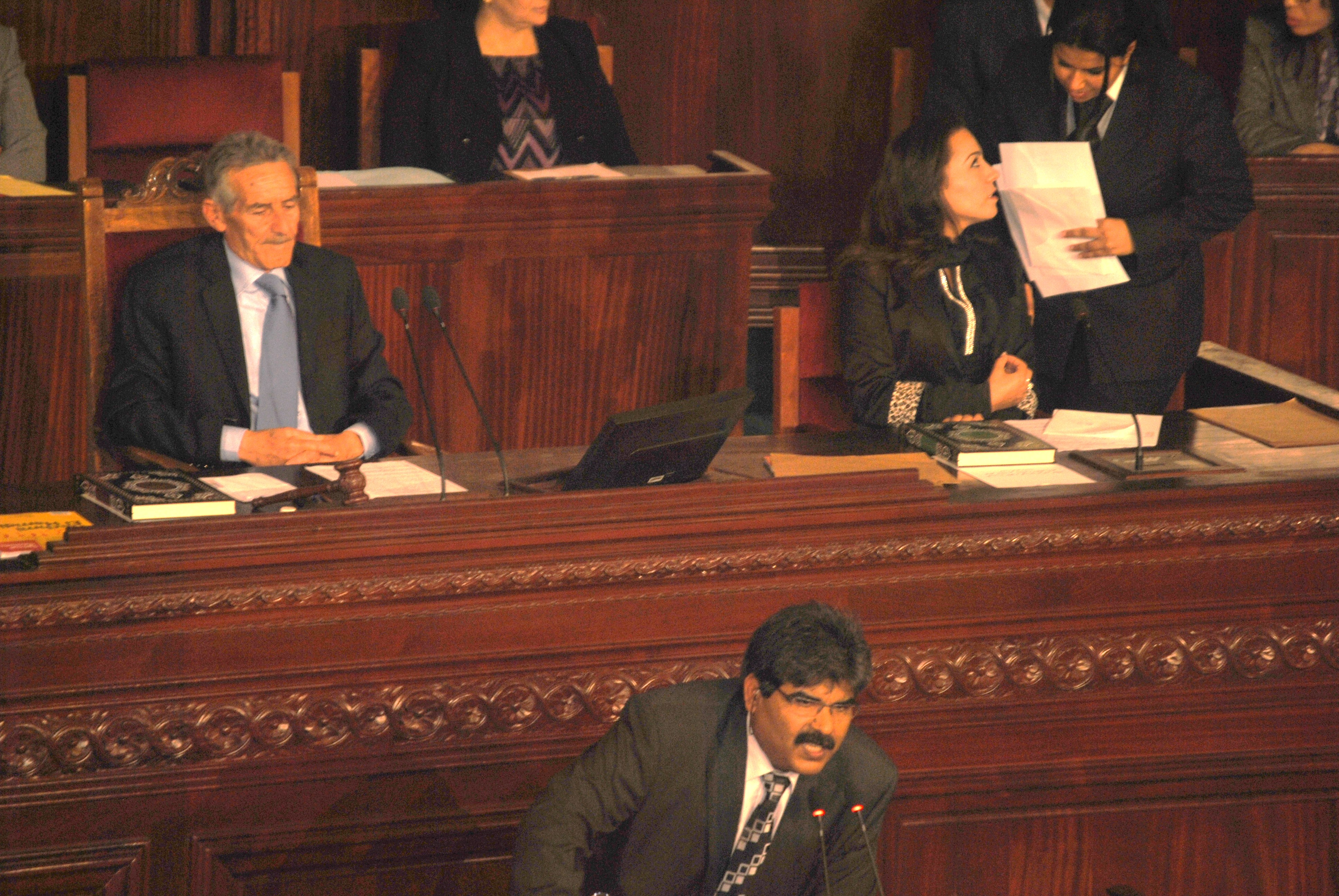 Mohamed Brahmi intervenant à la tribune de l'assemblée constituante tunisienne lors de la séance inaugurale.